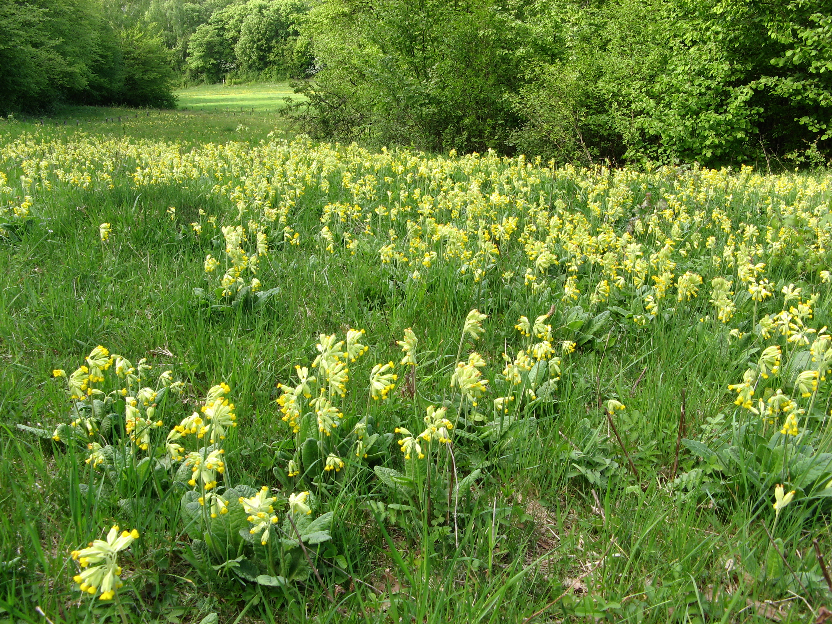 Wiese oberhalb der Schäfereiche mit Himmelschlüsseln (Primula veris), NSG Münchenberg